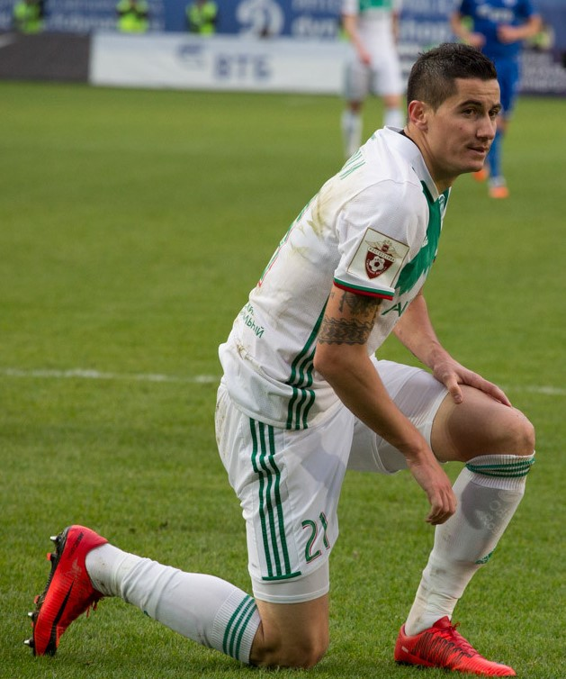 Odise Roshi